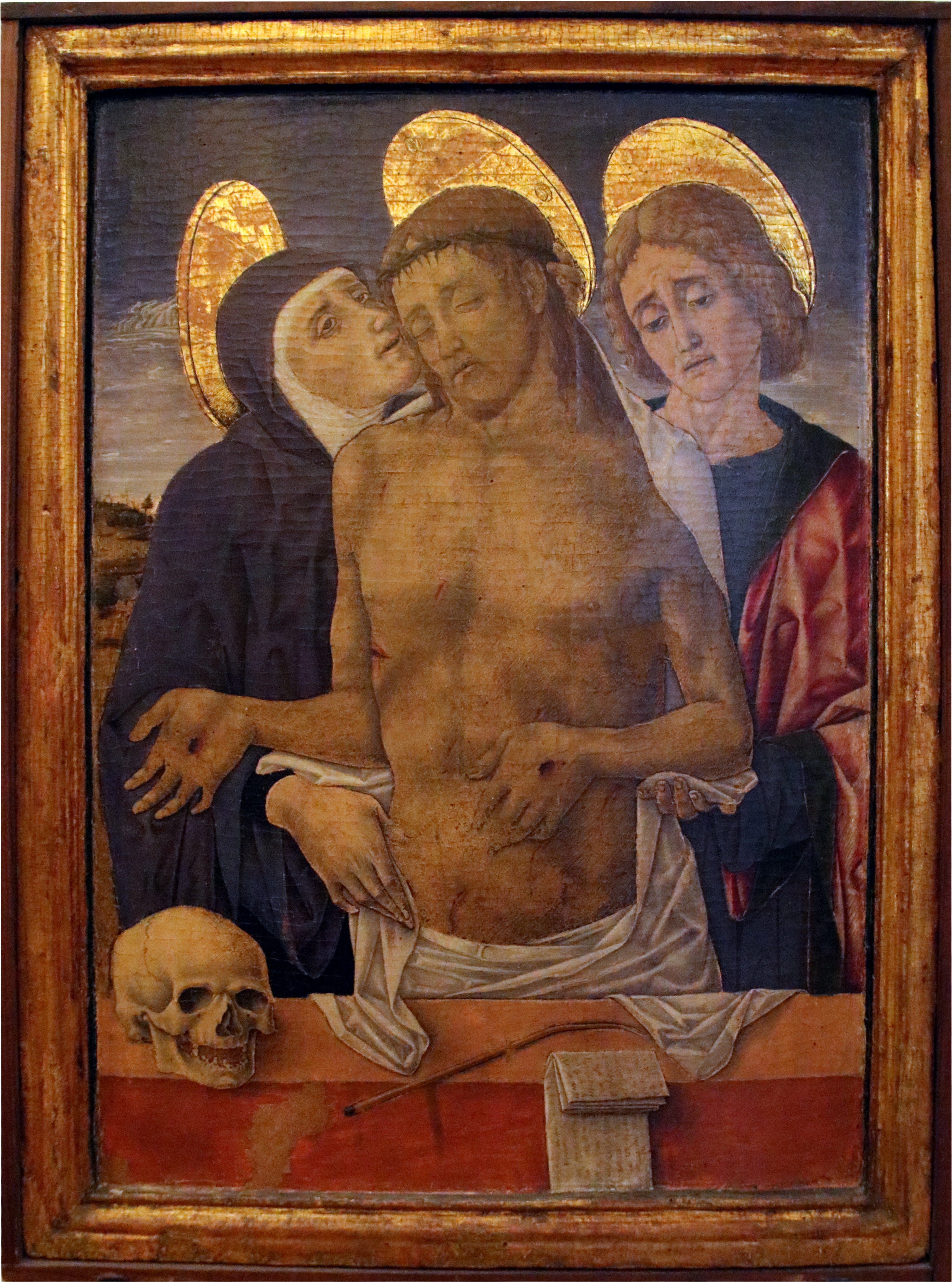 Galleria nazionale delle Marche This is a photo of a monument which is part of cultural heritage of Italy.